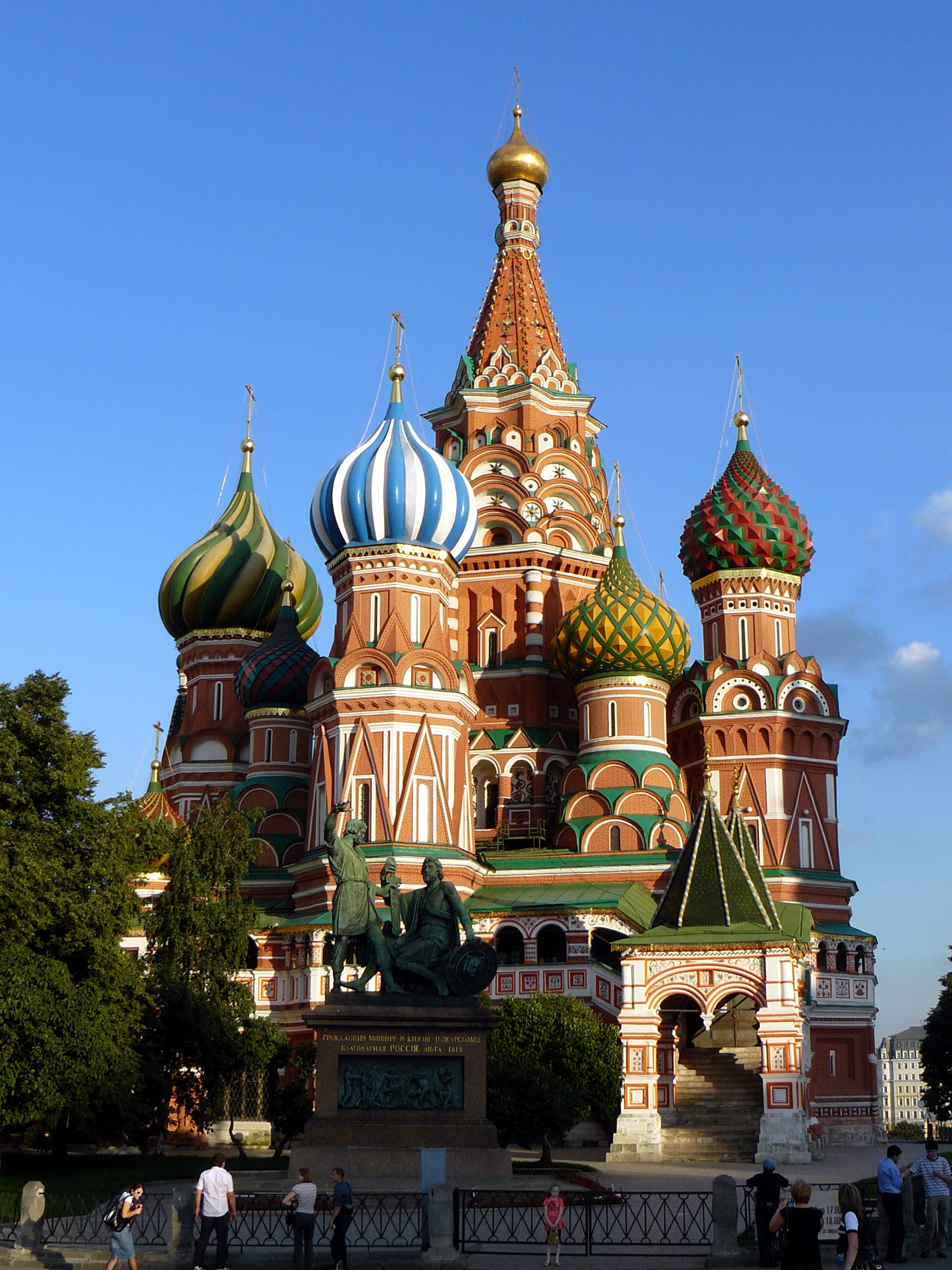 Собор Покрова Богородицы на Рву (Храм Василия Блаженного) 2008 год